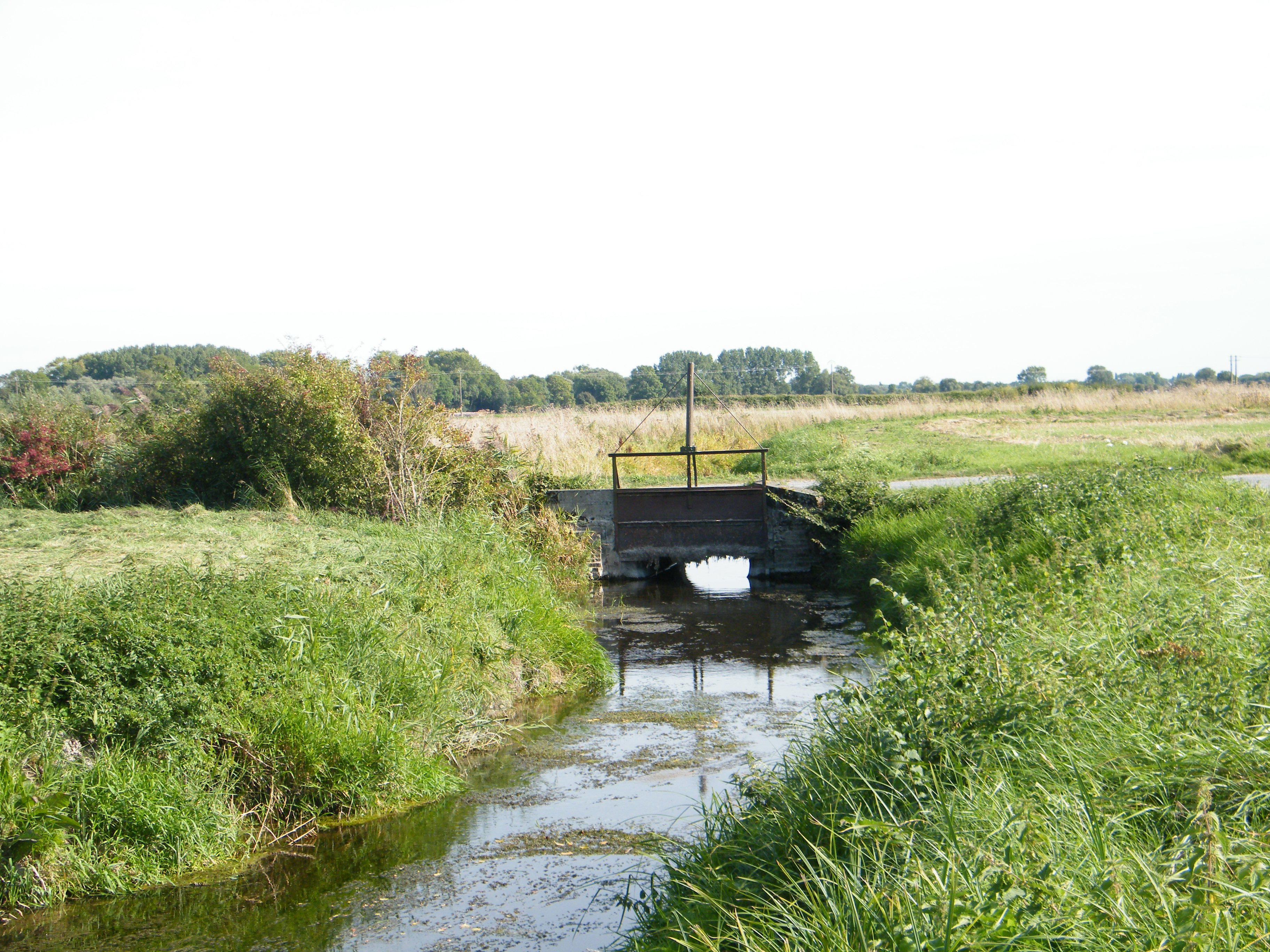 Favières, Somme, Fr, Pont de la Coupée dans les bas-champs.